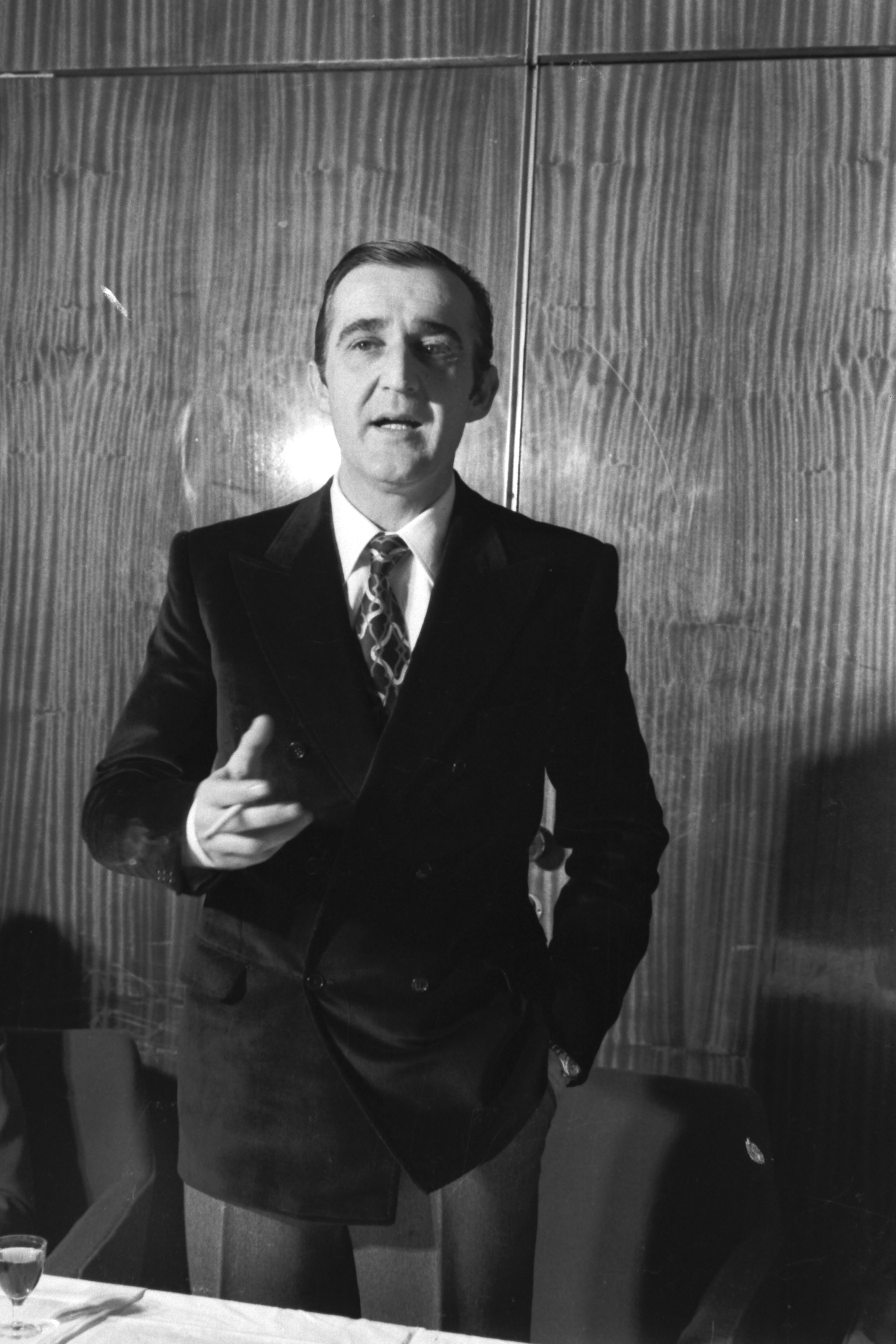 Veljko Bulajić, 1969. godine.foto: Stevan Kragujević (po odobrenju kćerke Tanje Kragujević).